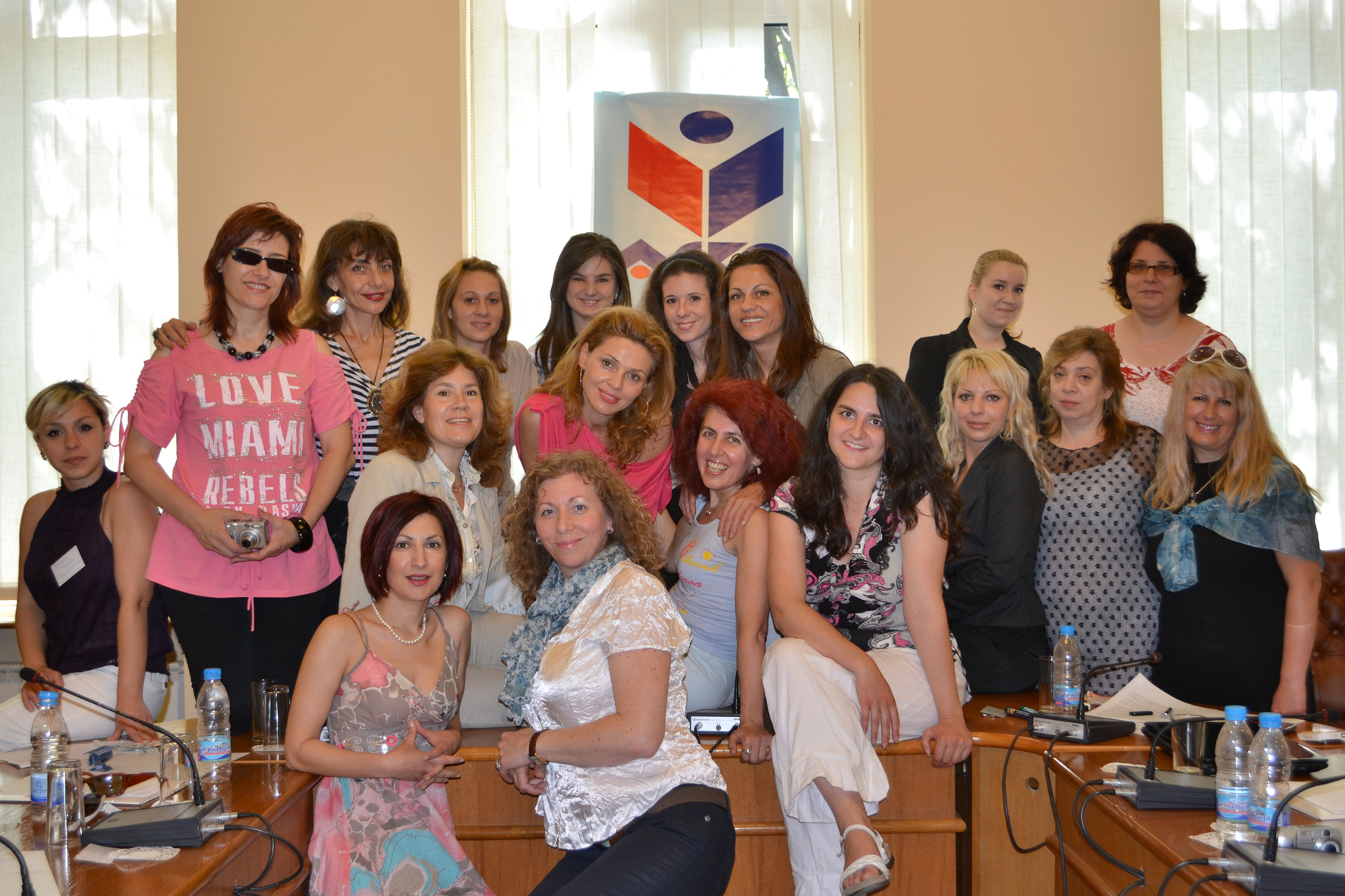 Екипът на АСКО